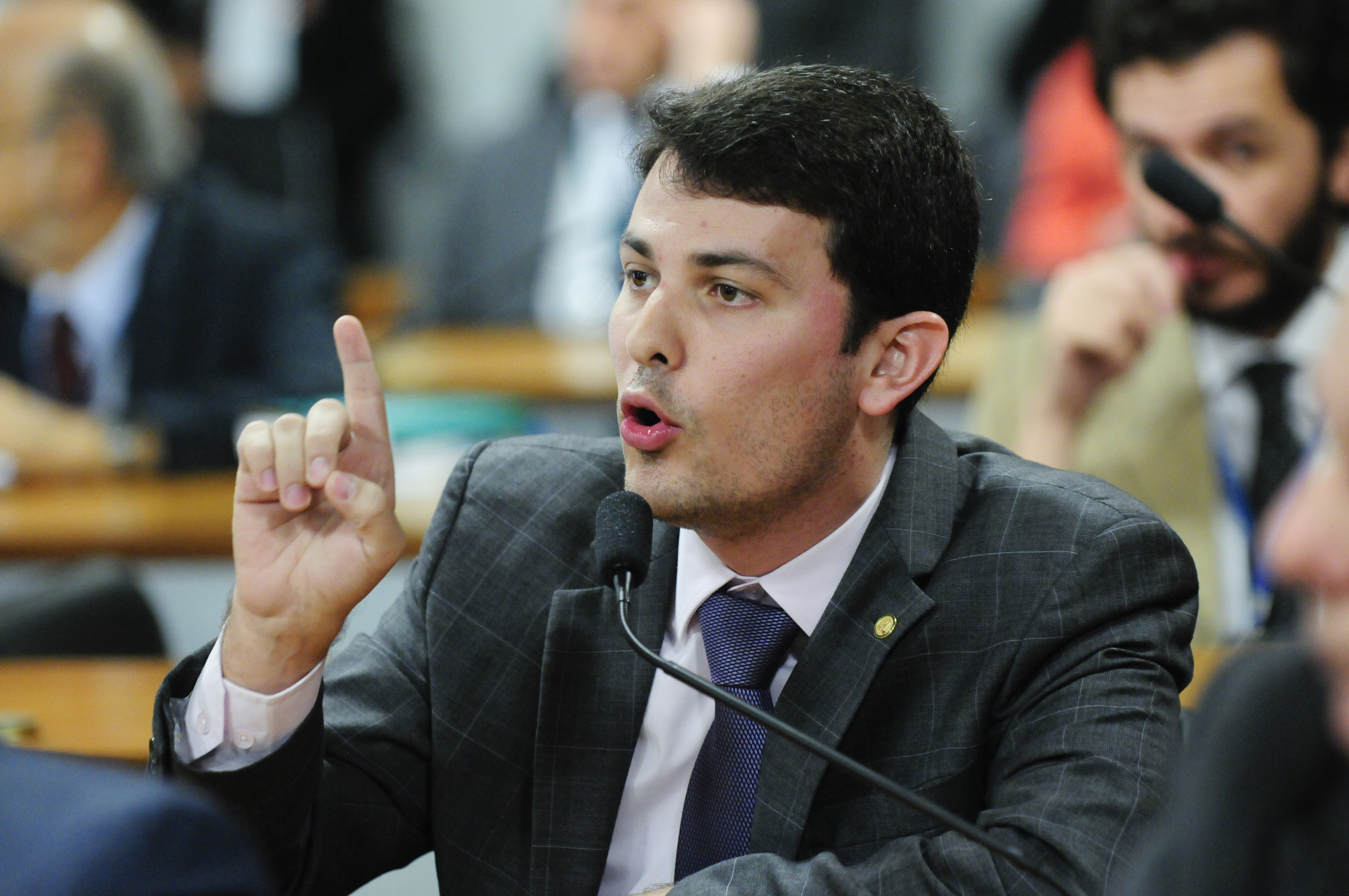 Comissão Mista da Medida Provisória (CMMPV) sobre MP 671/2015 que cria o programa de modernização da gestão e de responsabilidade fiscal do futebol brasileiro realiza reunião para apreciação de relatório. Em pronunciamento, deputado Marcelo Aro (PHS-MG). Foto: Geraldo Magela/Agência Senado